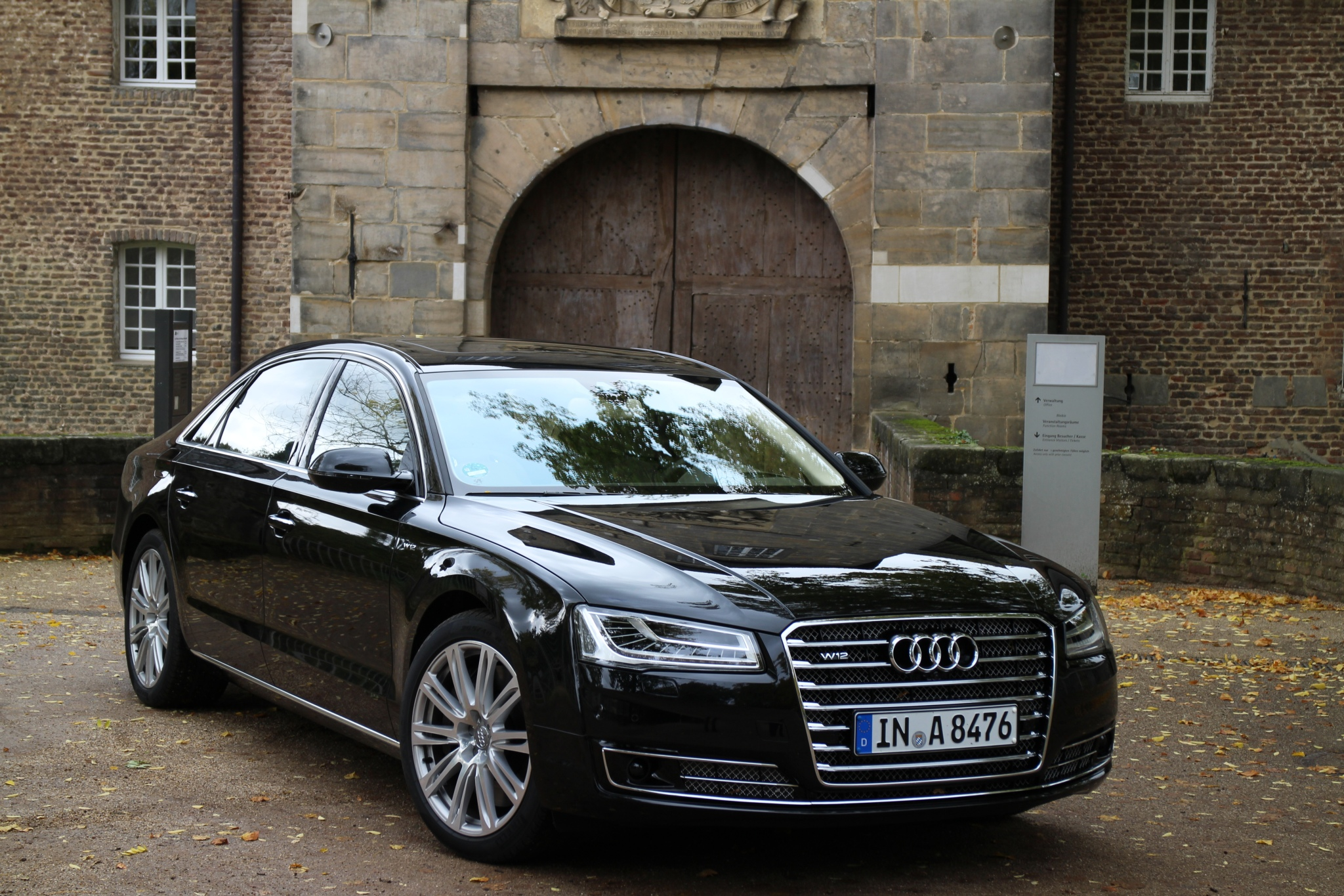 Facelift